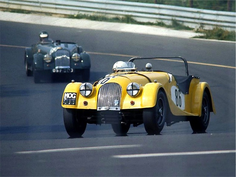 Morgan +4, Baujahr 1955, beim Oldtimer-GP 1976 auf dem Nürburgring ausgangs Nordkehre